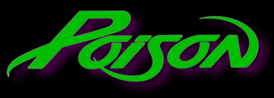 Logo de Poison.